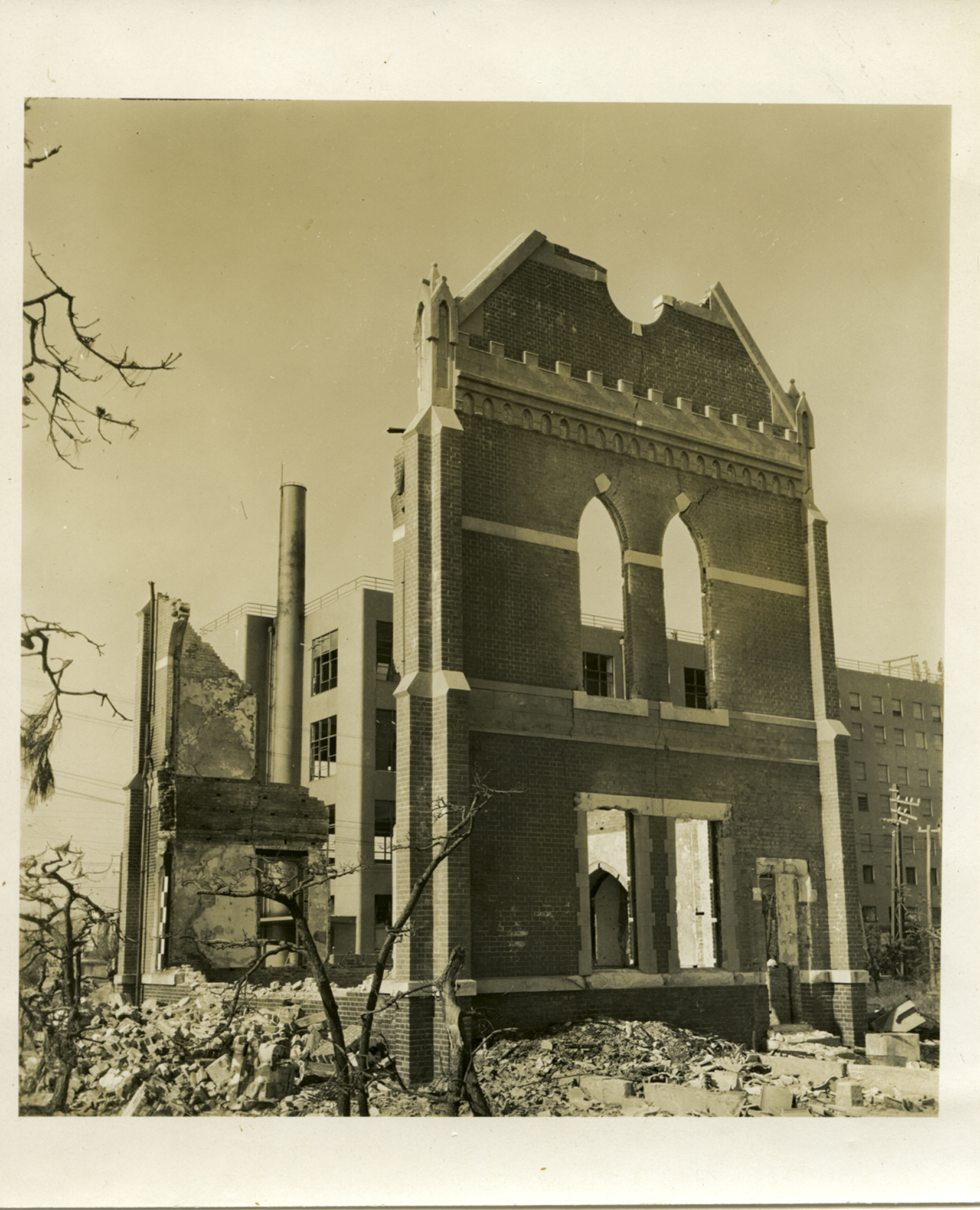 広島文理科大学永懐閣